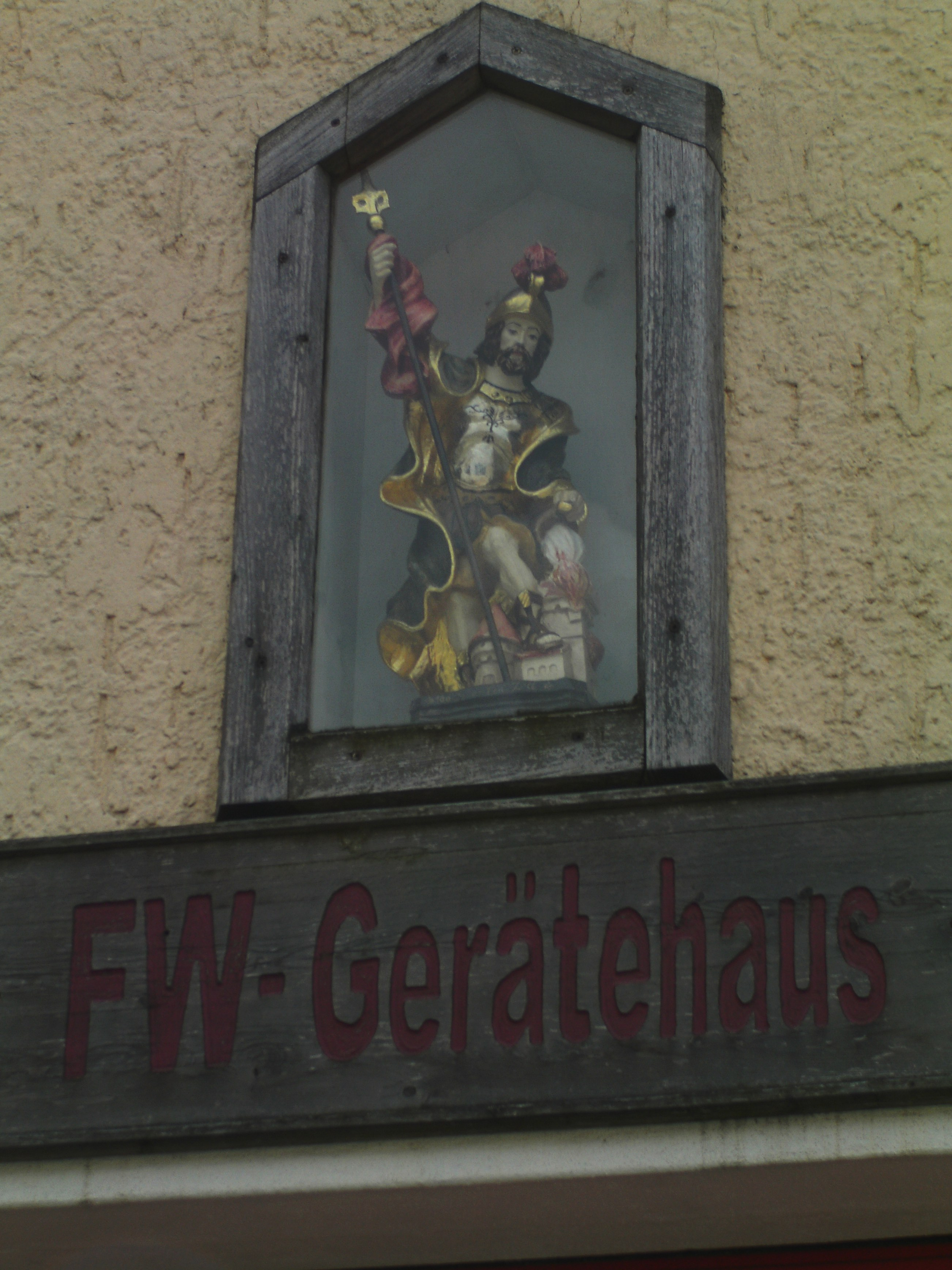 Arnsdorf, Ortsteil von Dietfurt an der Altmühl im Landkreis Neumarkt in der Oberpfalz, Figur des hl. Florian am Feuerwehr-Gerätehaus